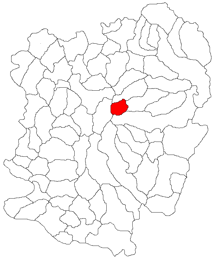 Categorie:Hărţi ale judeţului Caraş-Severin